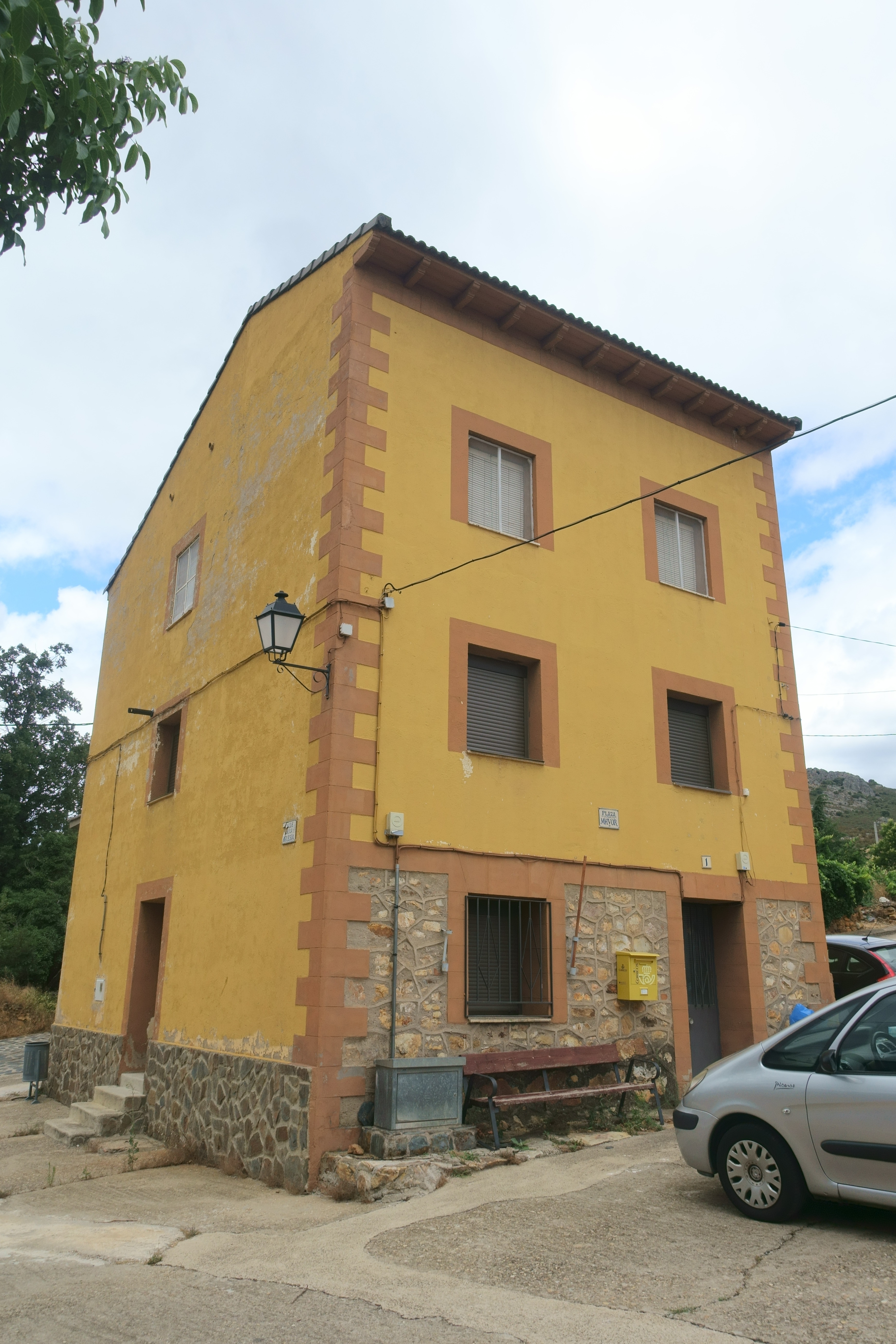 Casa consistorial de Semillas (Guadalajara, España).